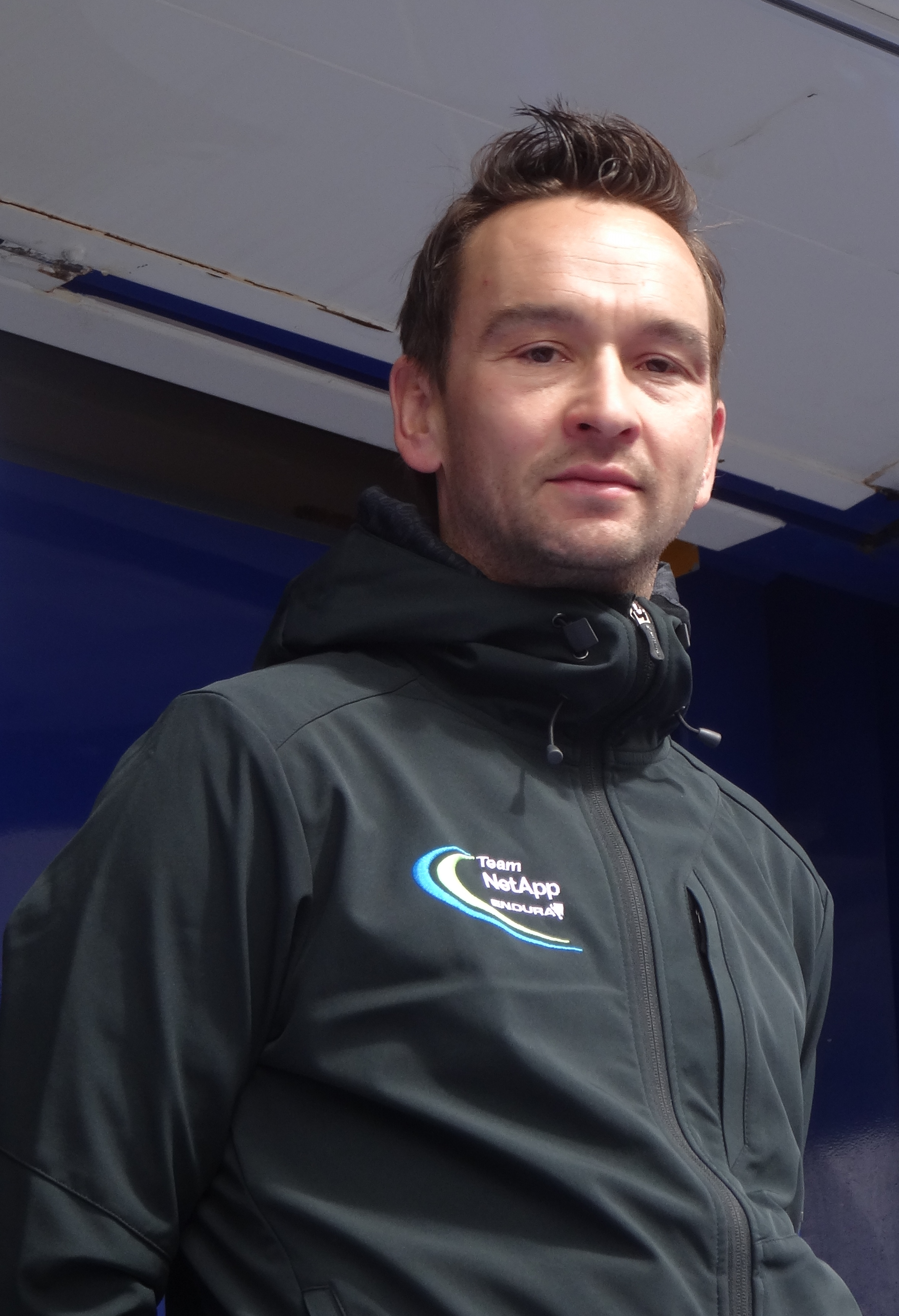 Reportage photographique réalisé le mercredi 7 mai 2014 au départ de la première étape de l'édition 2014 des Quatre jours de Dunkerque à Dunkerque, Nord, Nord-Pas-de-Calais, France. Depicted person: André Schulze Depicted team: NetApp-Endura